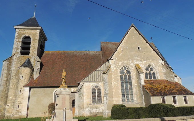 Église Notre-Dame-de-l'Assomption, facade Sud avec la tourelle qui flanque le clocher et un renfort du clocher inclus dans l'extension du toit de la nef et avec le pignon de l'extension du transept coté ouest à pans de bois